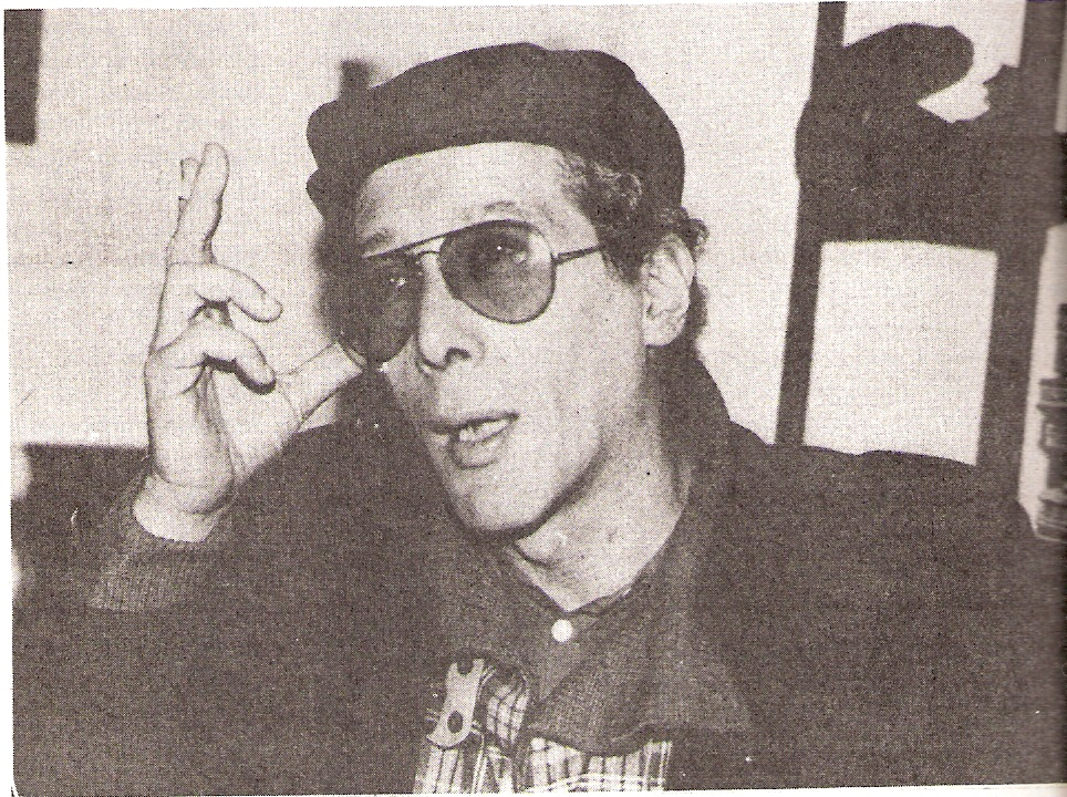 director de cine argentino Alejandro Doria